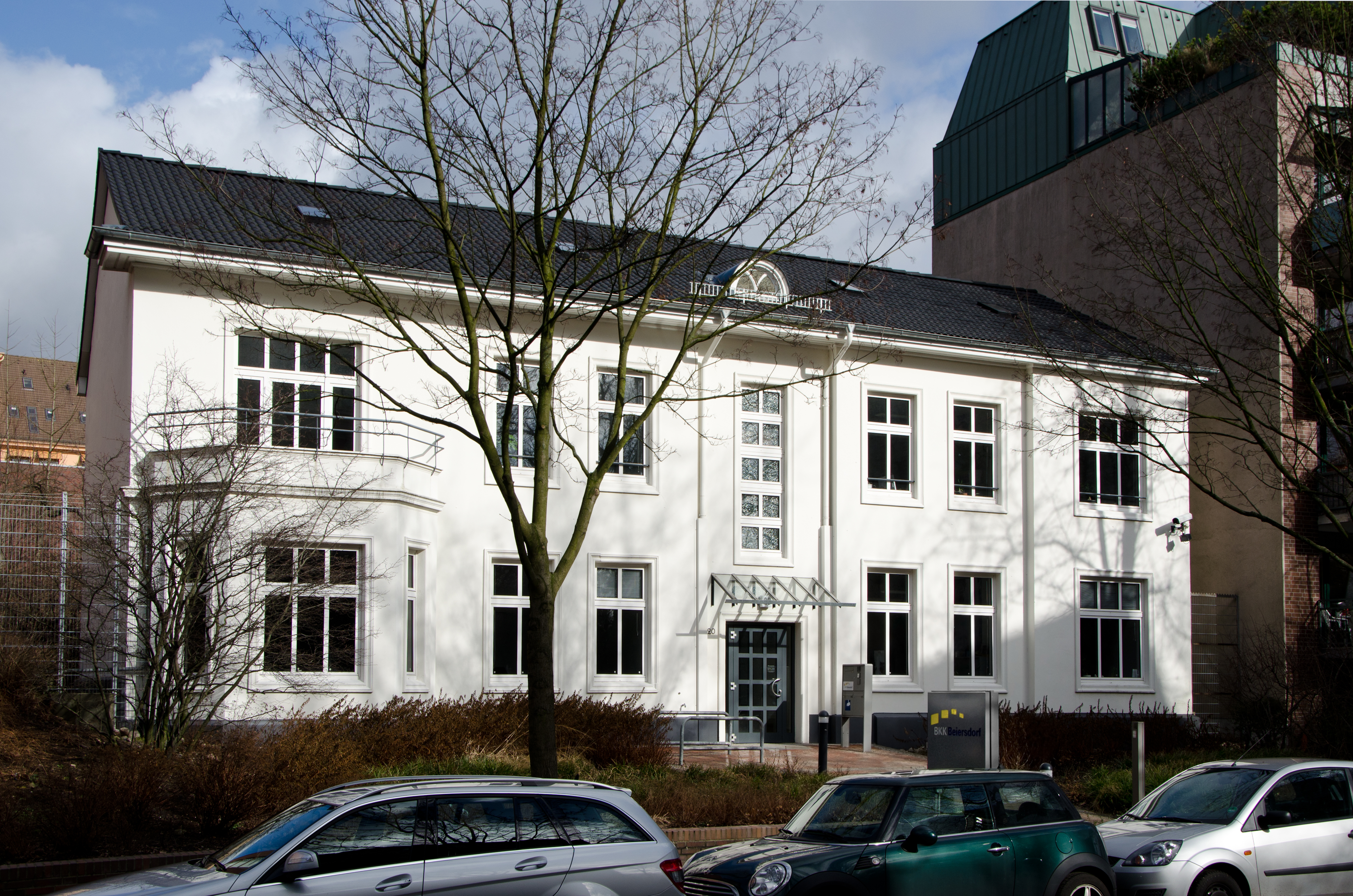 Zentrale der BKK Beiersdorf in Hamburg